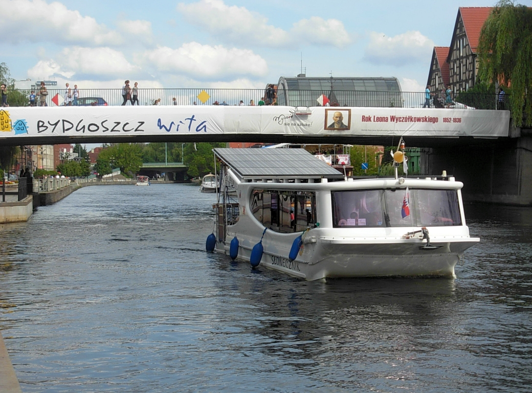 Tramwaj wodny solarny w Bydgoszczy